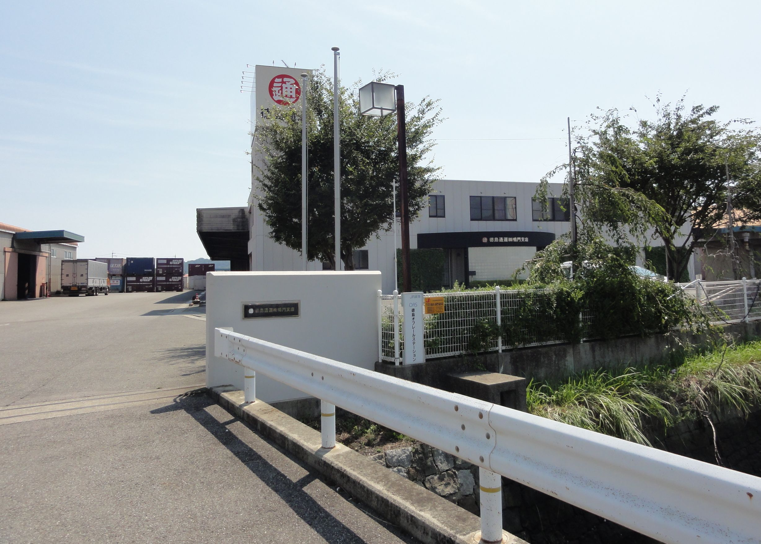 徳島ORS